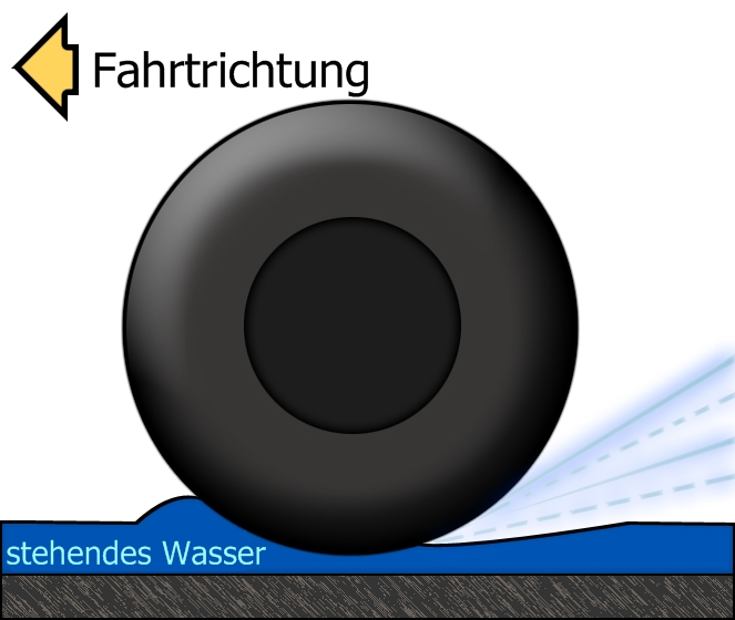 Hydroplaning (Aquaplaning)